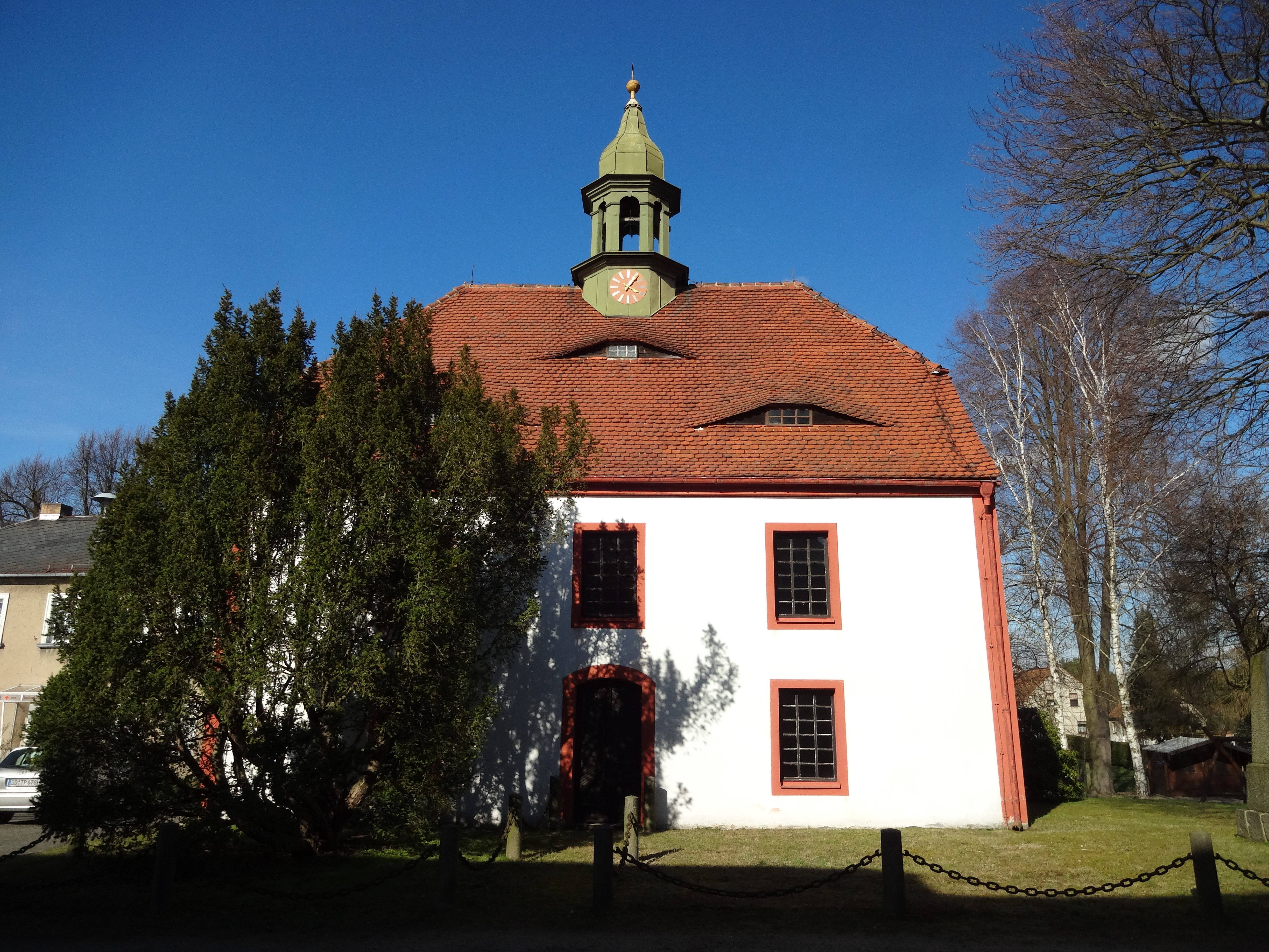 Denkmalgeschützte Kirche in Cosel, Gemeinde Schwepnitz (Sachsen)